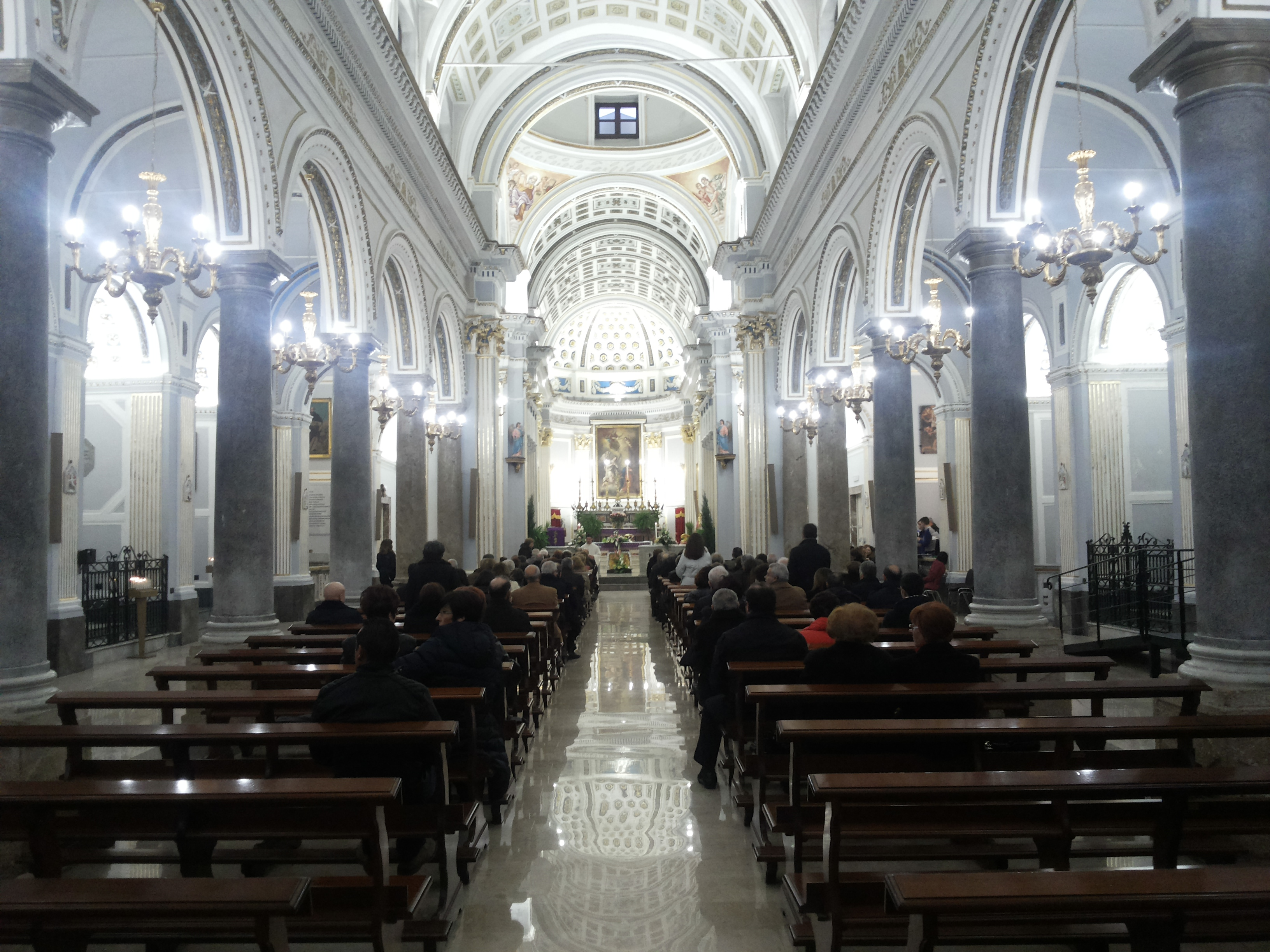 Chiesa Maria Santissima Annunziata (Partinico)